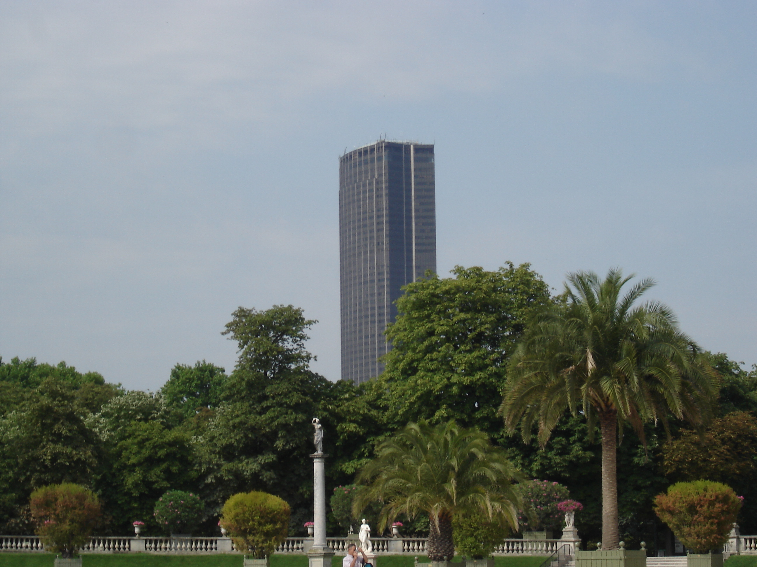 Paris